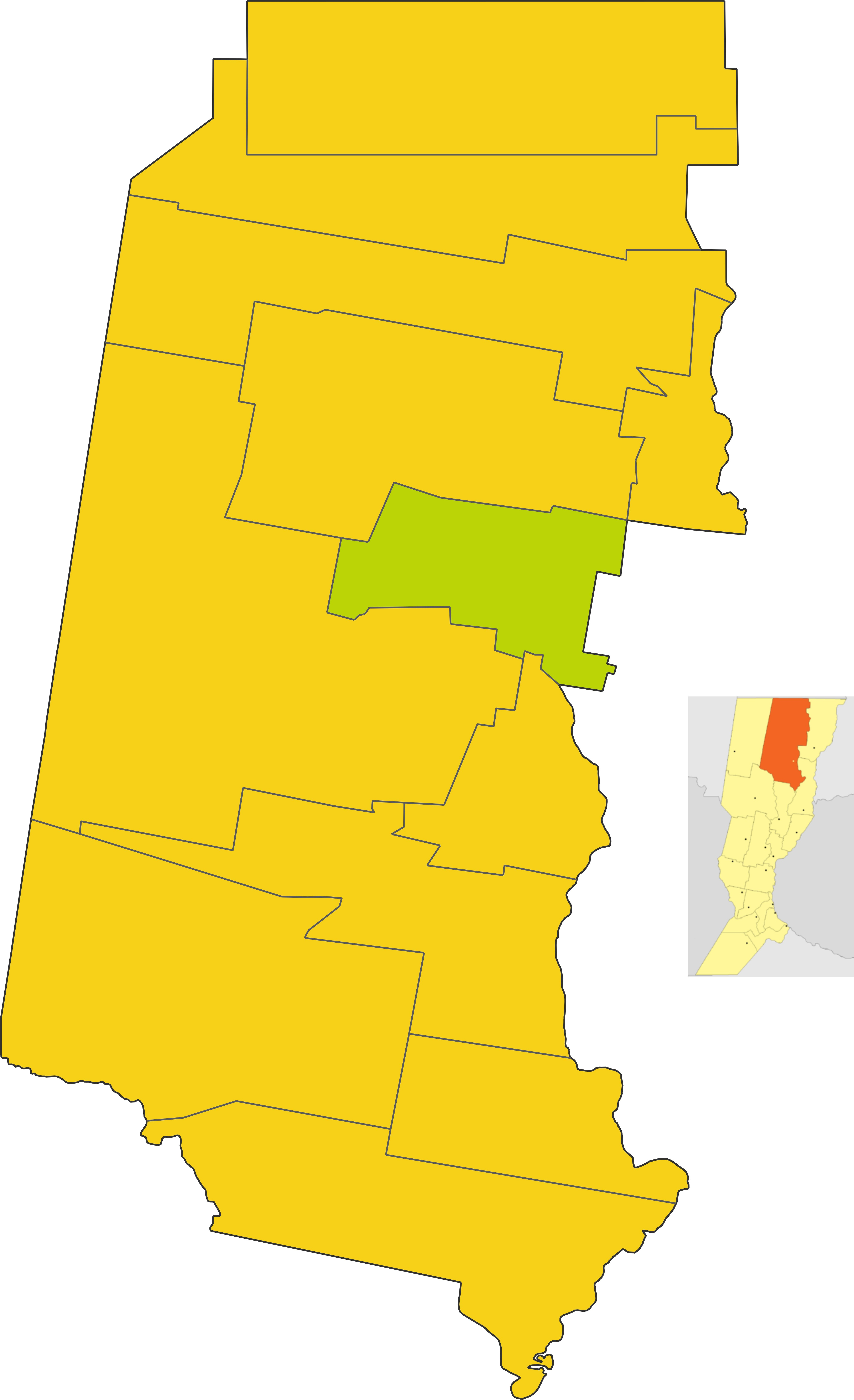 Map of the comuna de Garabato in Vera department, Santa Fe department, Argentina